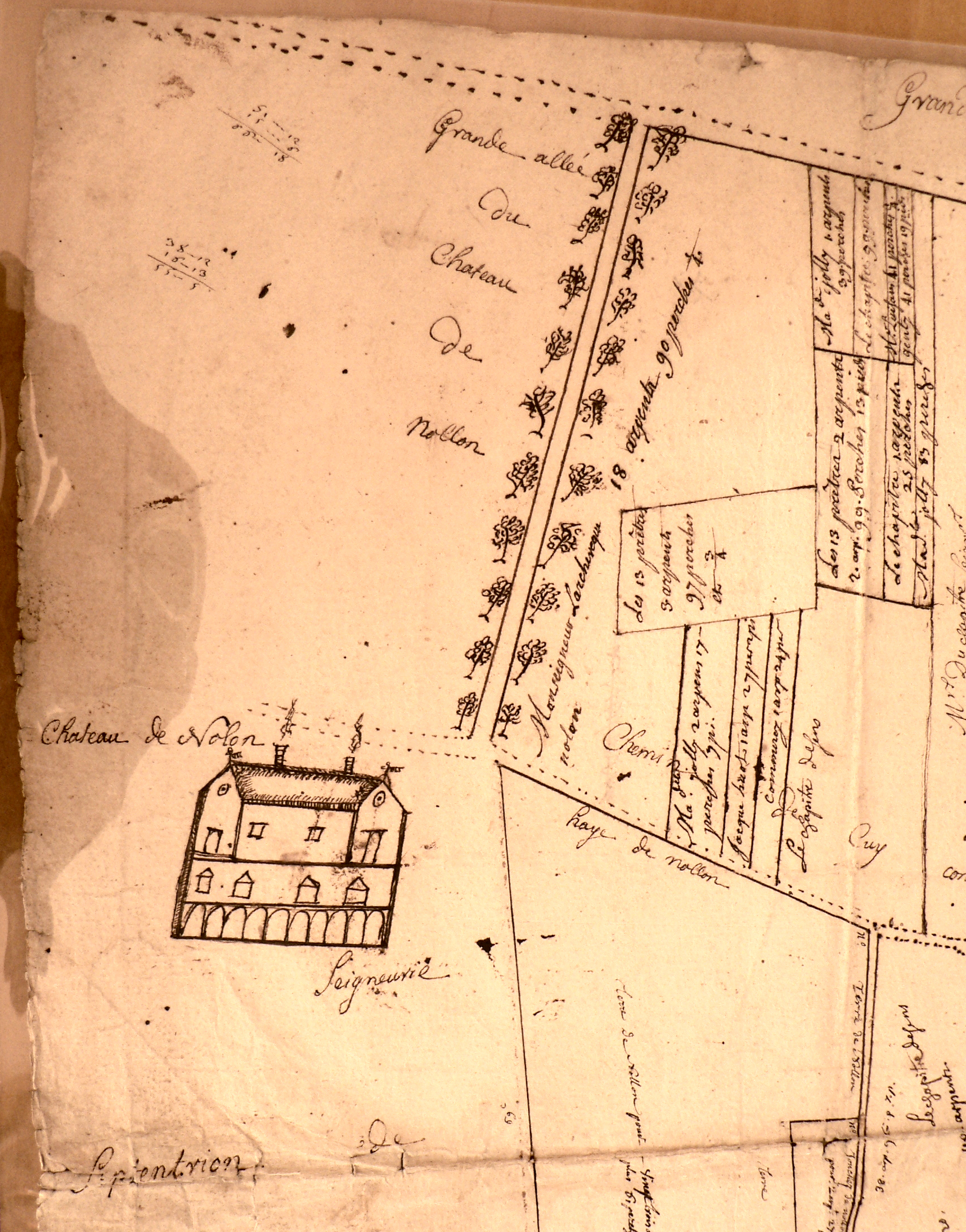 Localisation et vue cavalière très schématique du château de Noslon.